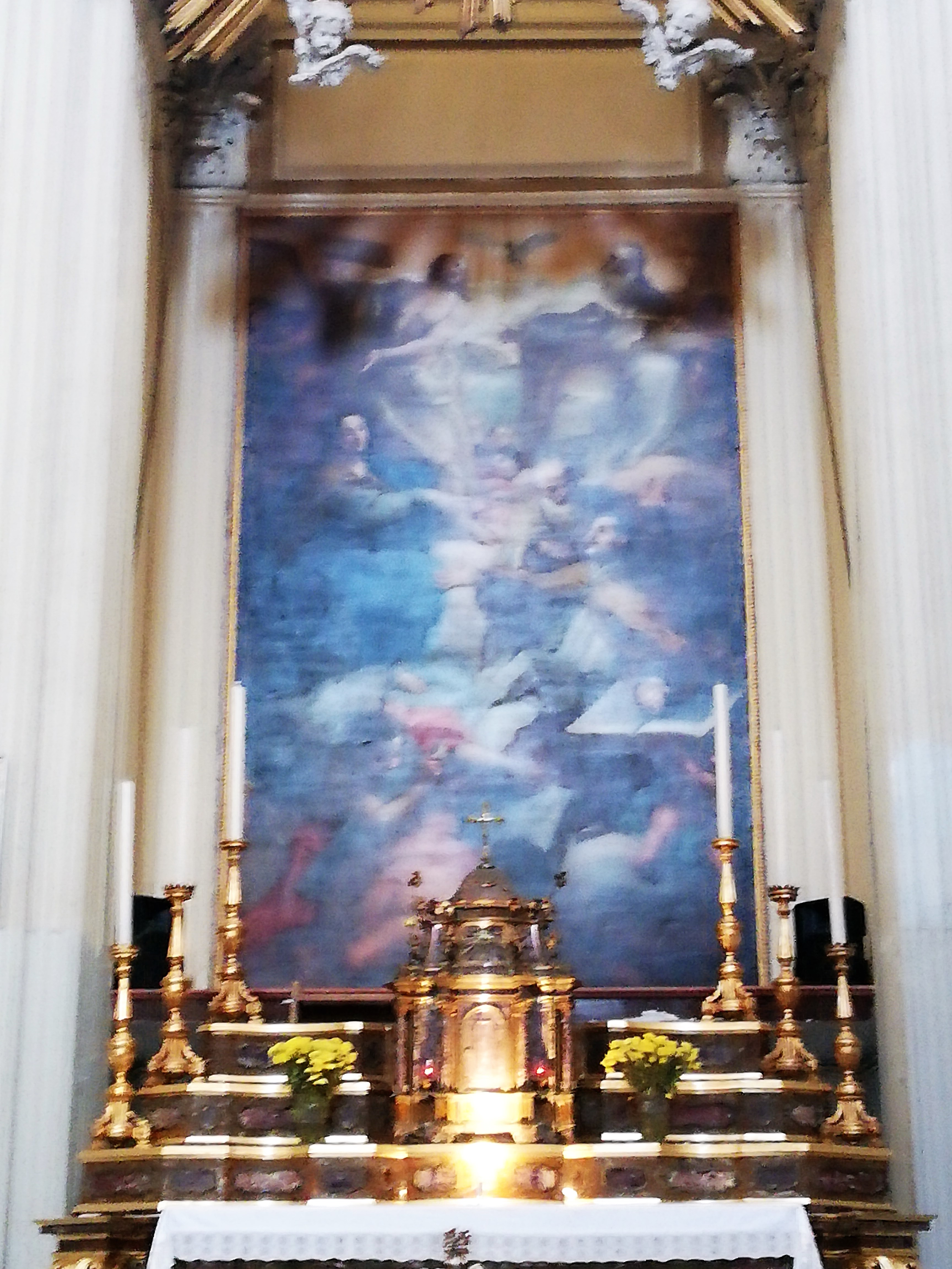 Pala d'altare.